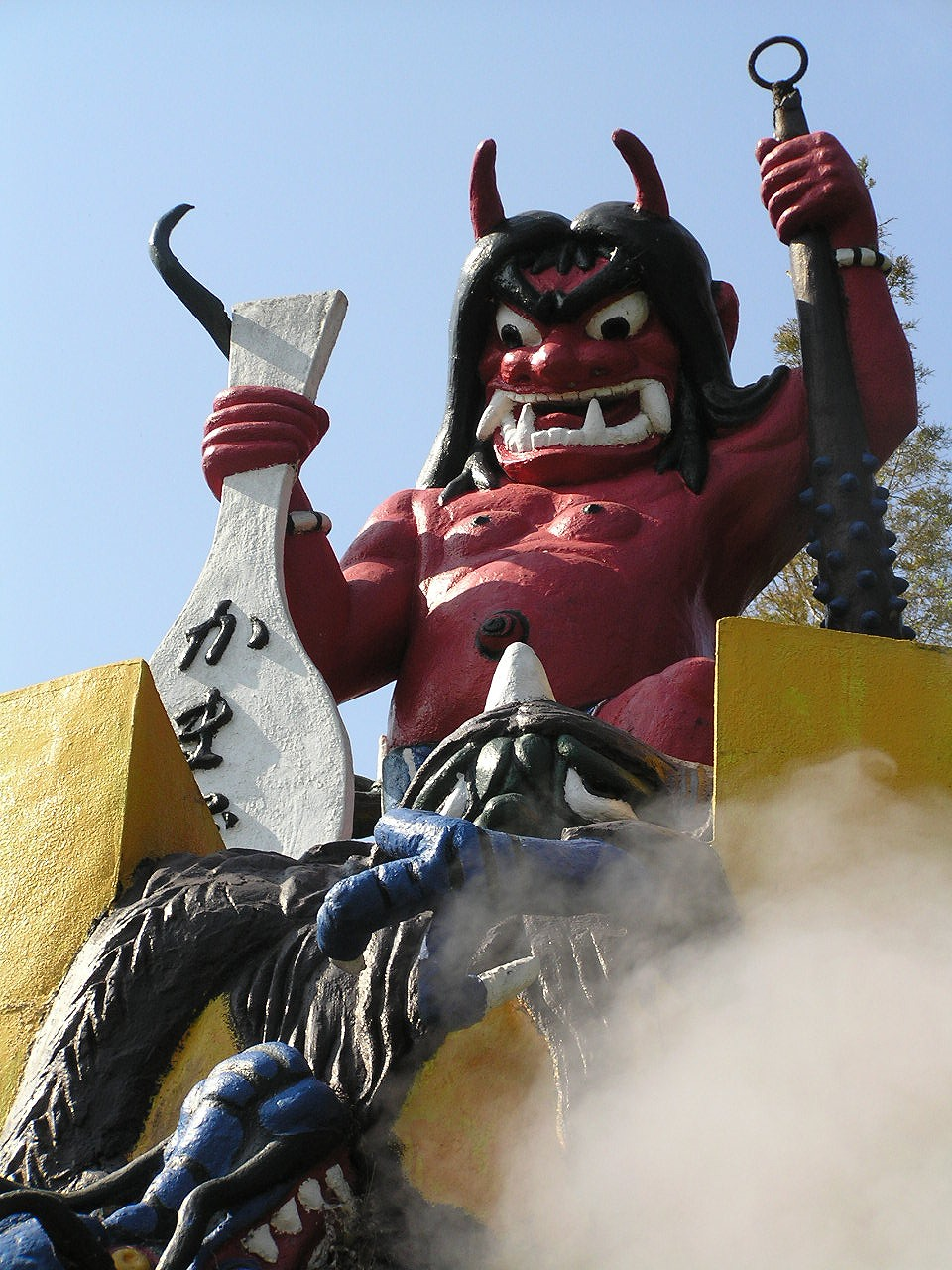 鬼山地獄の鬼